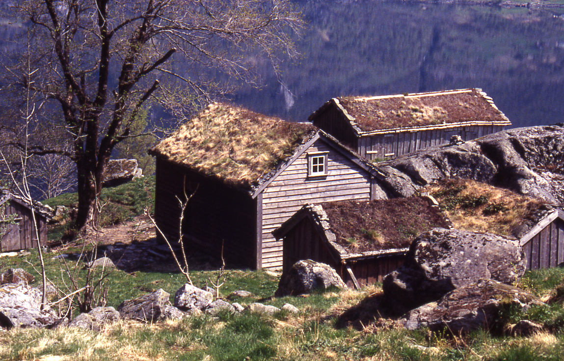 Ryfylkemuseet Suldal Røynevarden